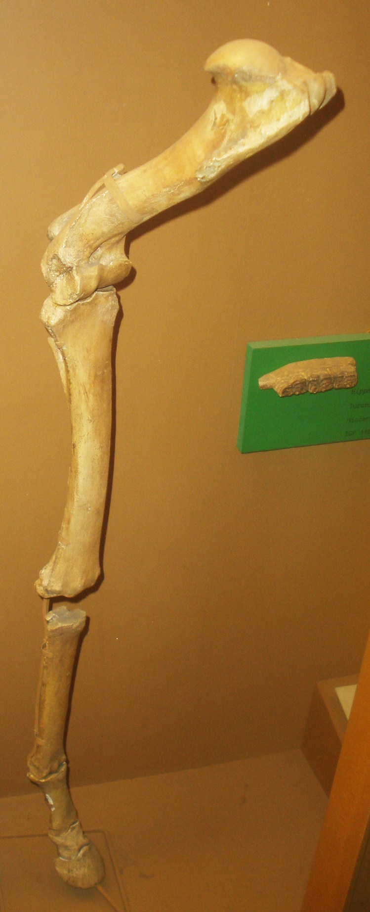 Fossil of Equus, an extinct mammal - Took the picture at Museo di Paleontologia di Firenze